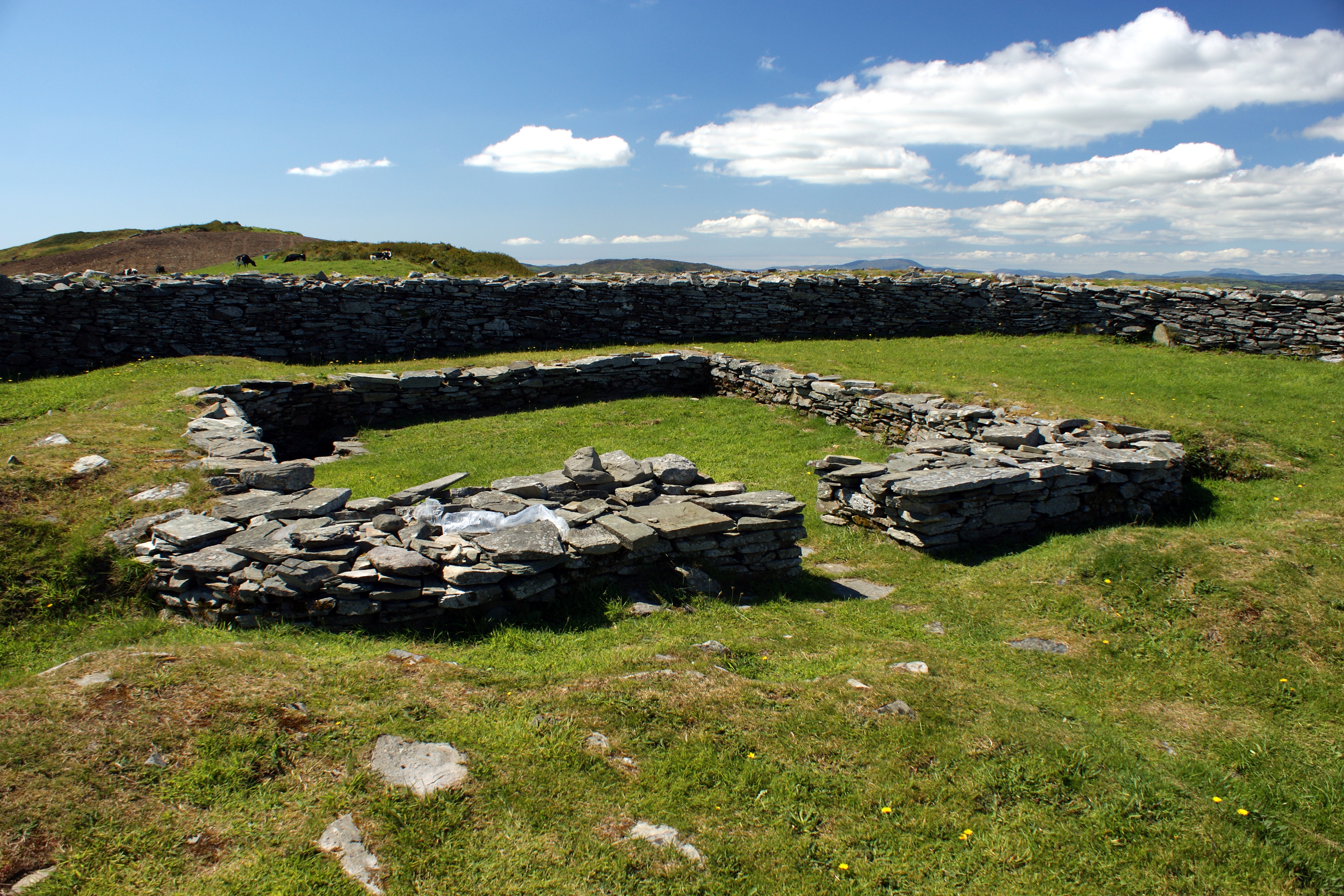 inside